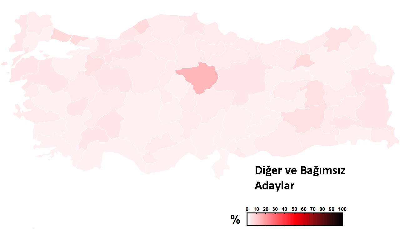 Diğer ve Bağımsız Adaylar oy oranları